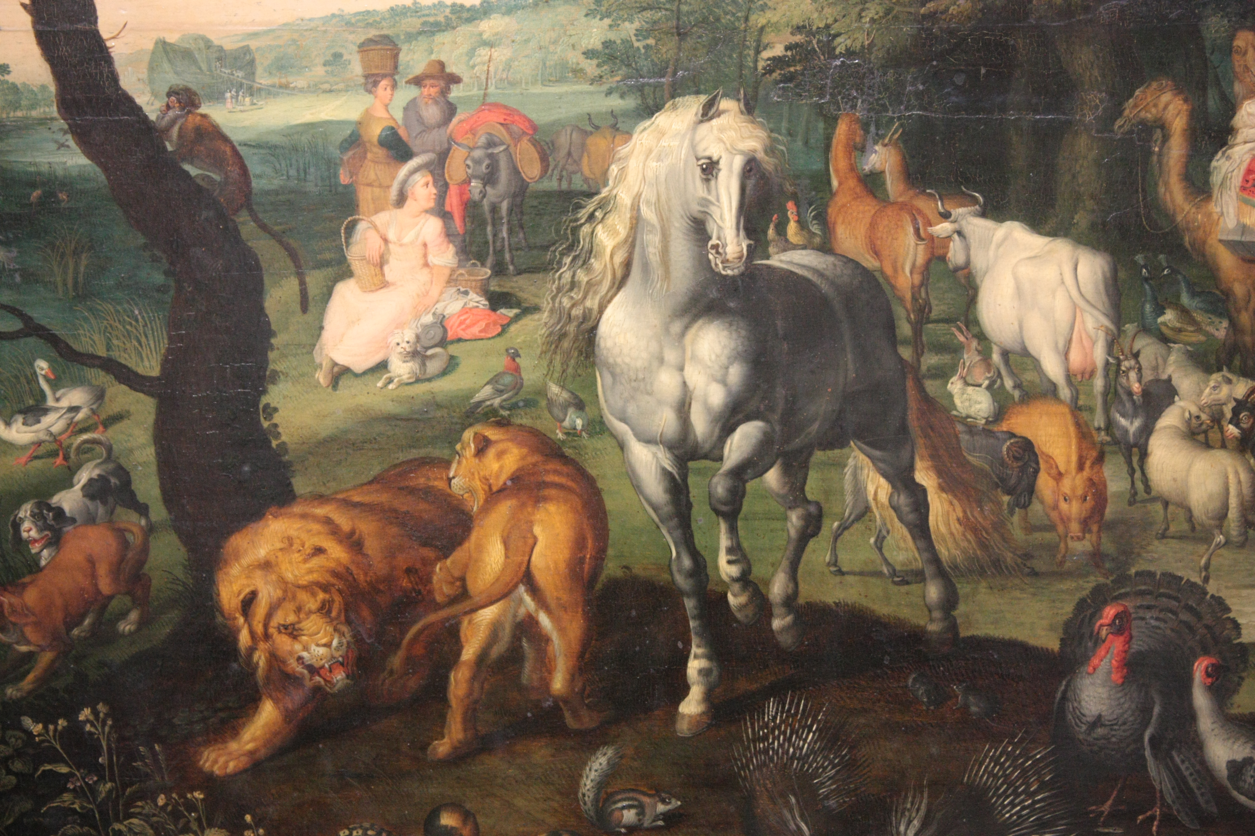 L'Entrée dans l'Arche par Jan Brueghel l'Ancien, début 17e siècle. Détail du centre de l’œuvre.